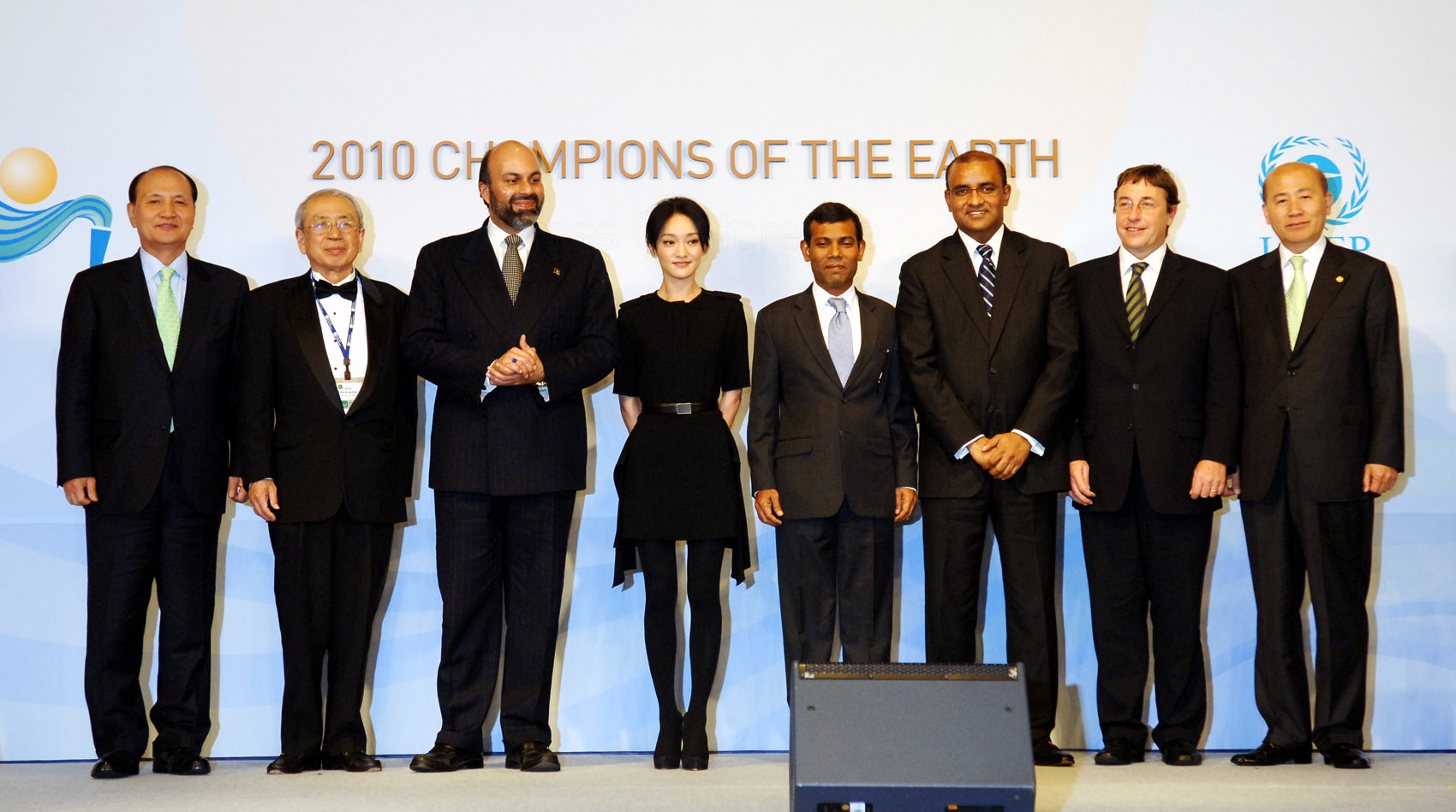 (왼쪽부터)남용부회장, 타로 타카하시 박사, 모스타파 자헤르 아프가니스탄 왕자, 중국 영화배우 저우쉰, 모하메드 내쉬드 몰디브대통령, 바렛 잭데오 가이아나 대통령, 아킴 슈타이너 유엔환경계획 사무총장, 이만의 환경부 장관